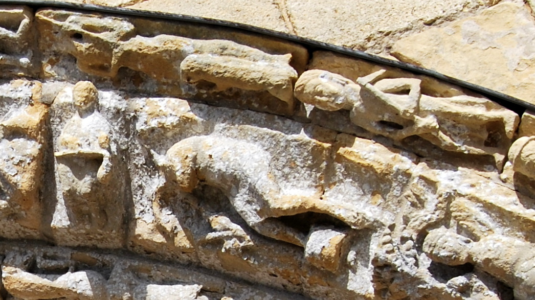 Détails du Zodiaque du Portail